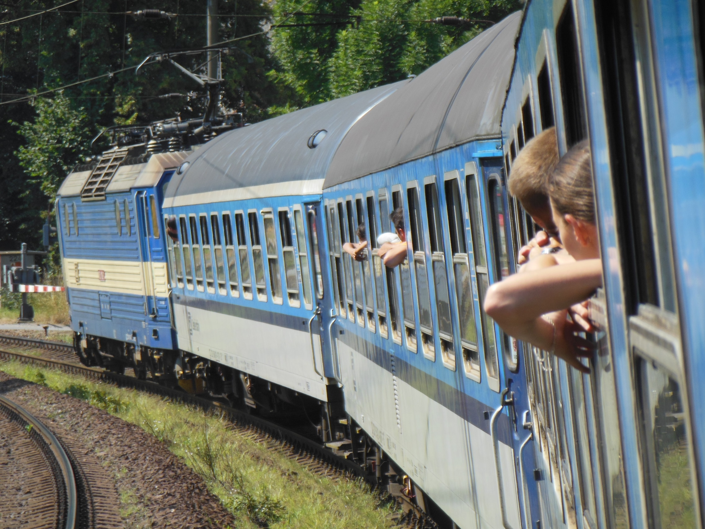 Rychlík na trati mezi Želenicemi nad Bílinou a Mostem.